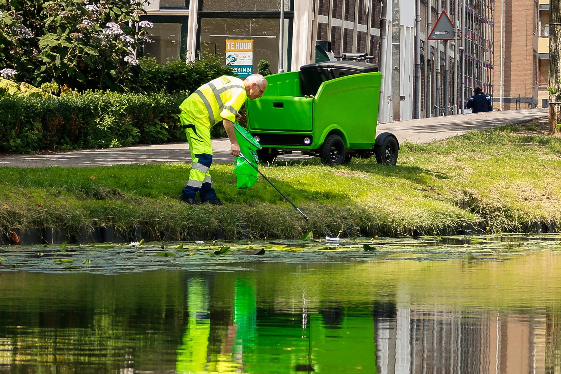 Gemeente Gouda Stint